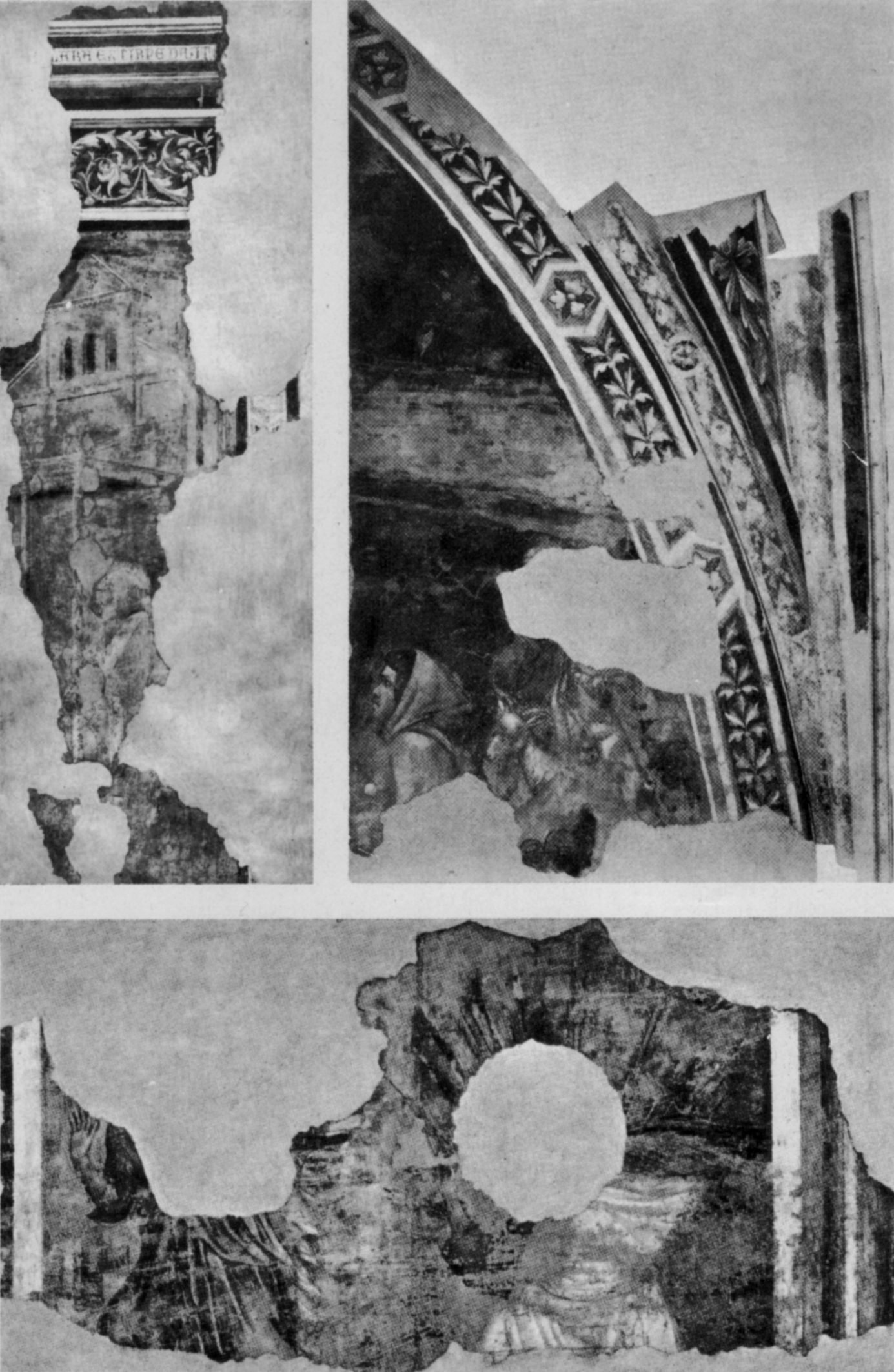 frammenti di storie della vergine dalla badia fiorentina